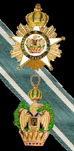 Eigen tekening Robert Prummel